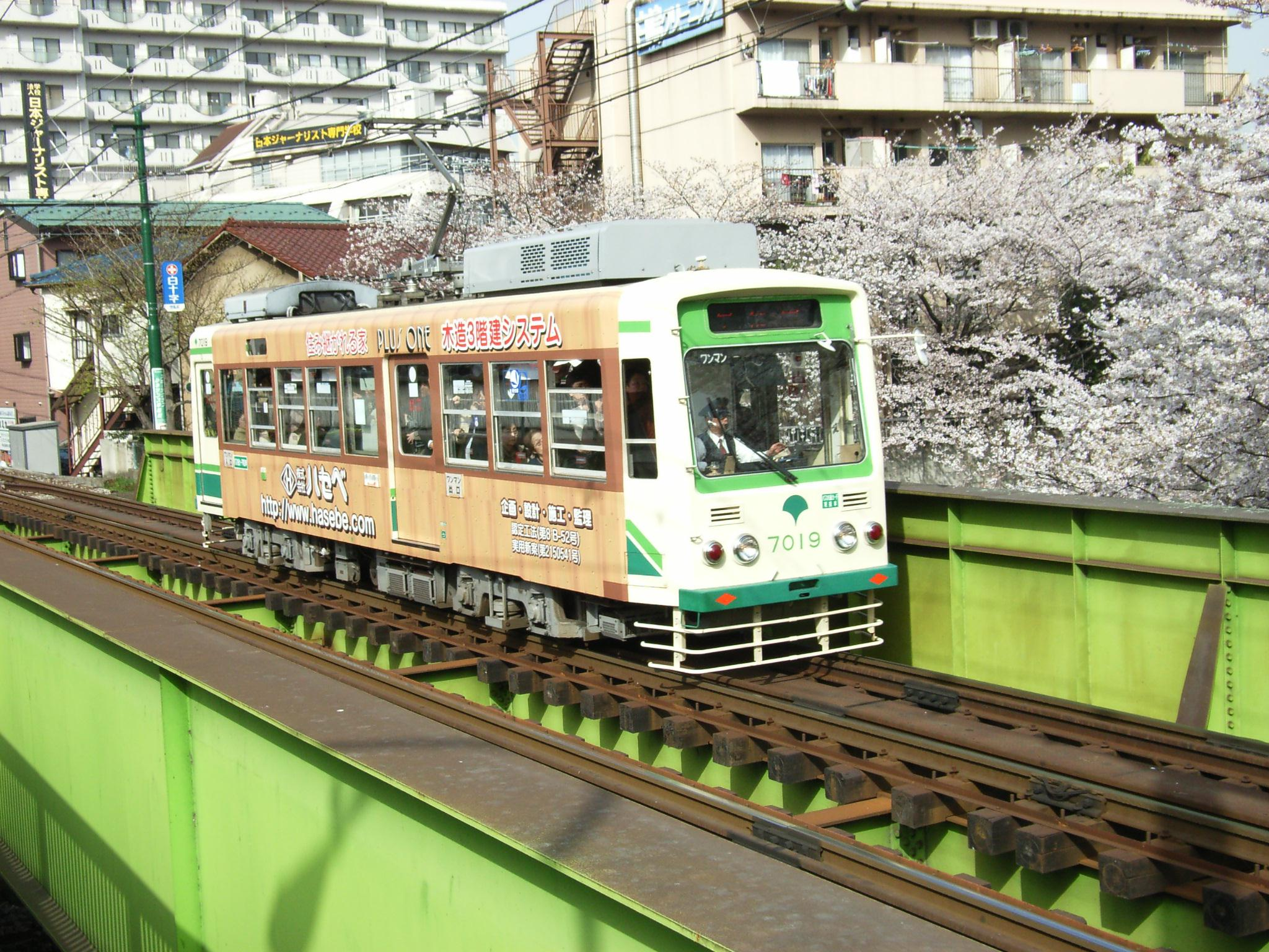 Toden Arakawa Line No. 7019 (Wrap advertising)